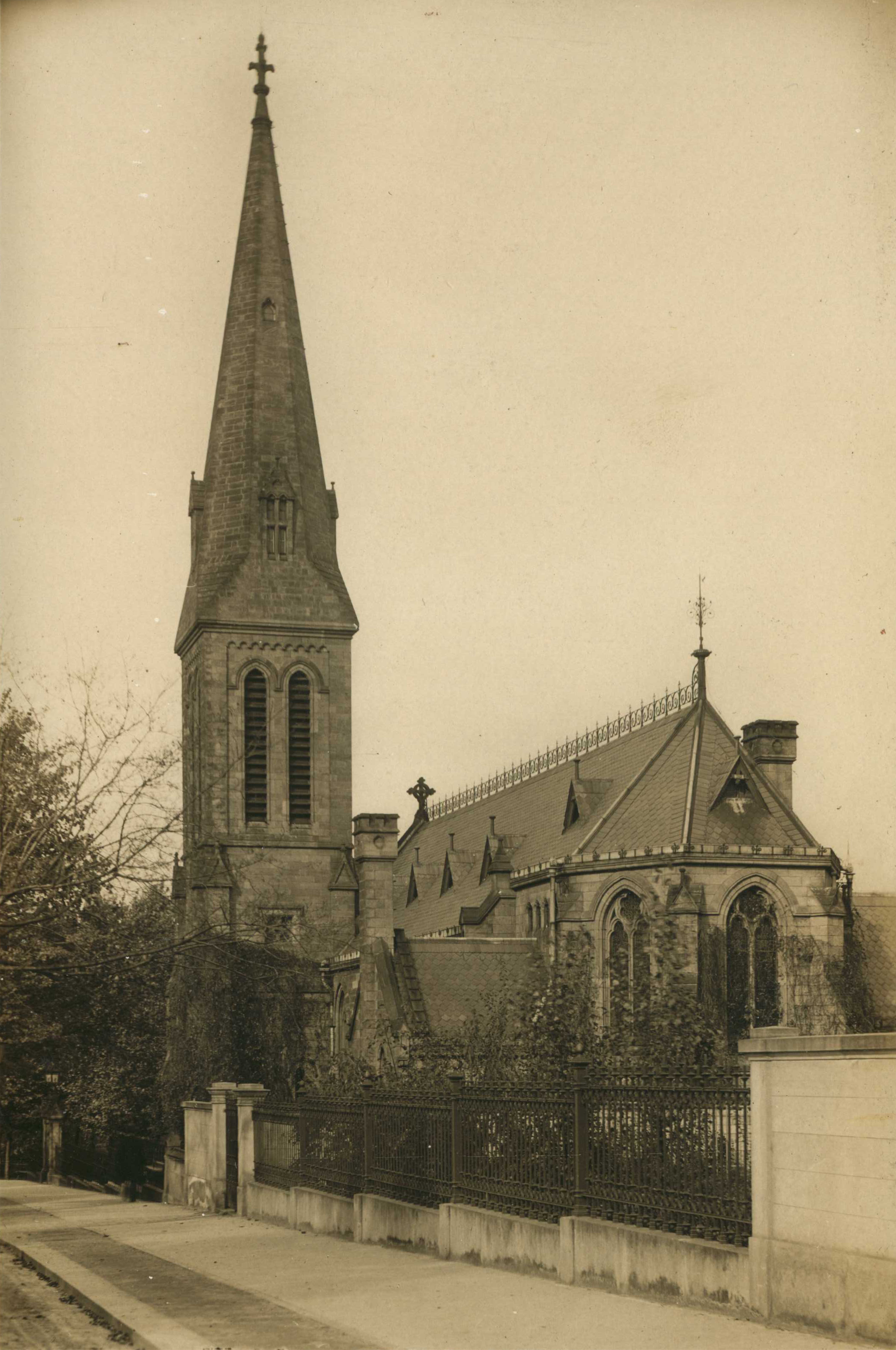 Amerikanische KircheLeporello: Bild 1, Bild 2, Bild 3, Bild 4, Bild 5, Bild 6, Bild 7, Bild 8, Bild 9, Bild 10, Bild 11, Bild 12, Bild 13, Bild 14, Bild 15, Bild 16, Bild 17, Bild 18, Bild 19, Bild 20